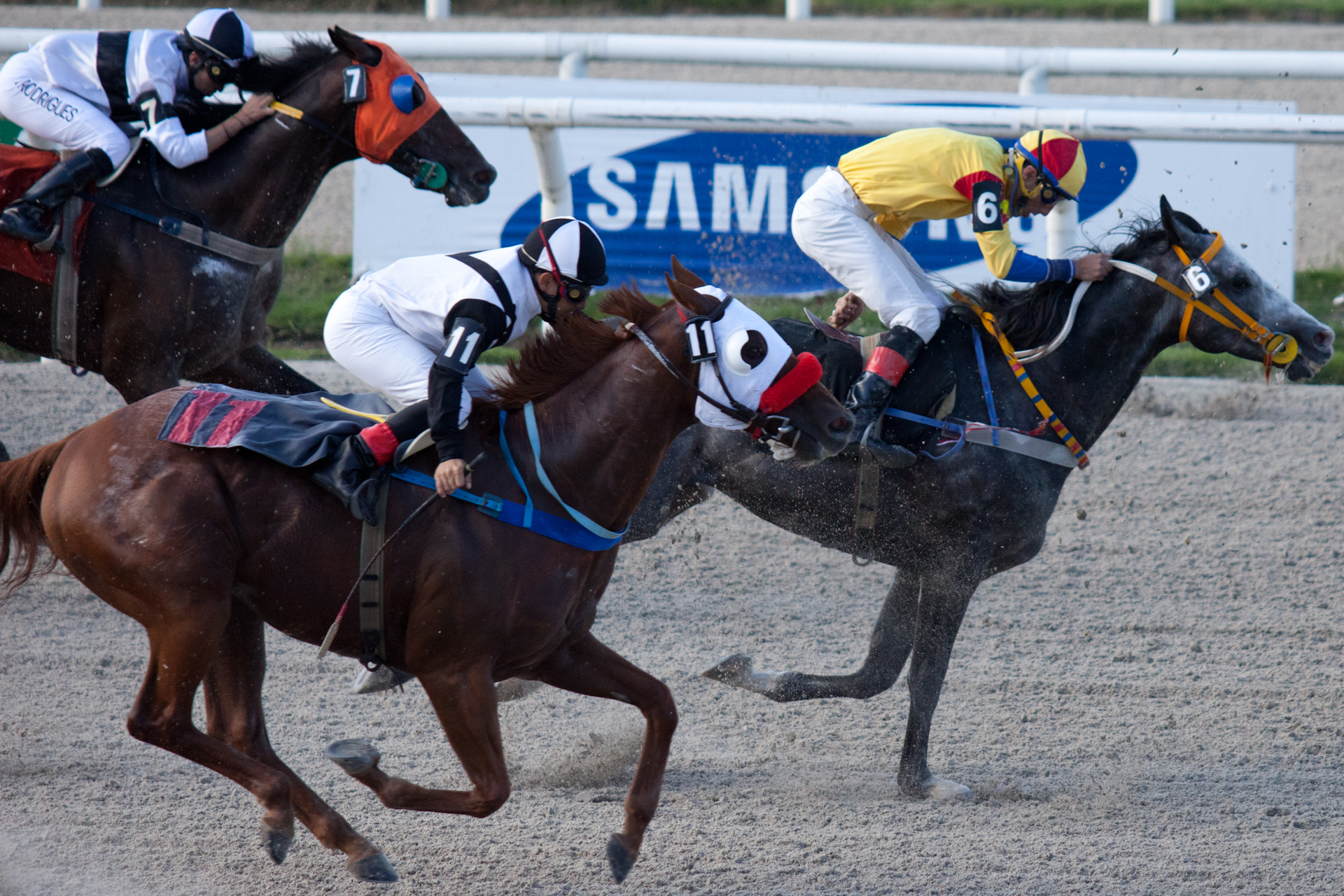 Maroñas, Montevideo, Uruguay. Camera: Canon EOS 5D Mark II 0 ISO: 2000